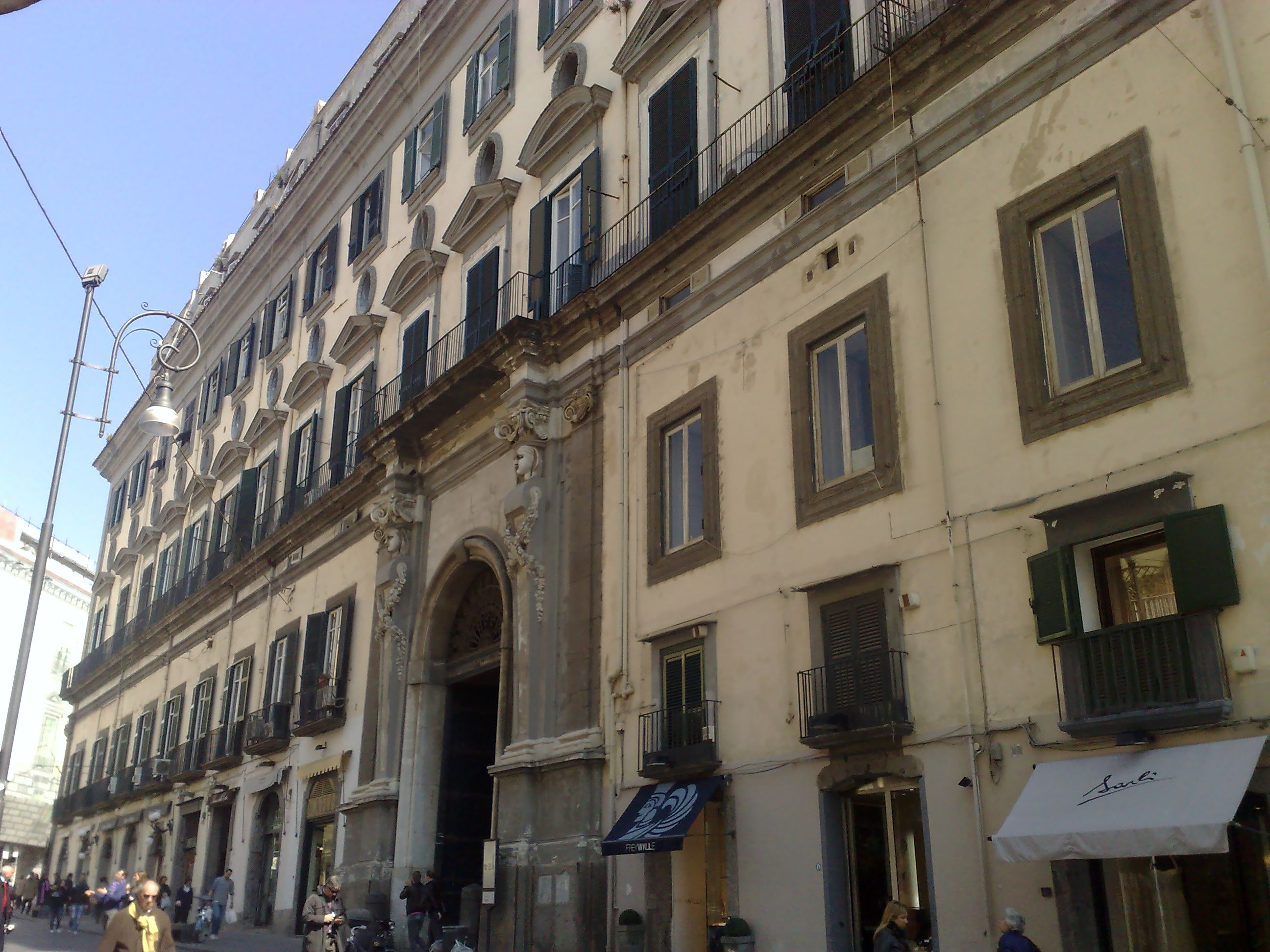 Palazzo Calabritto (Napoli)